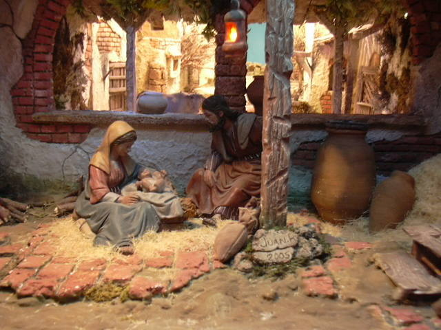 Nativity scene - Belén de la casa de la entrevista (Alcalá de Henares) Diorama Pesebre